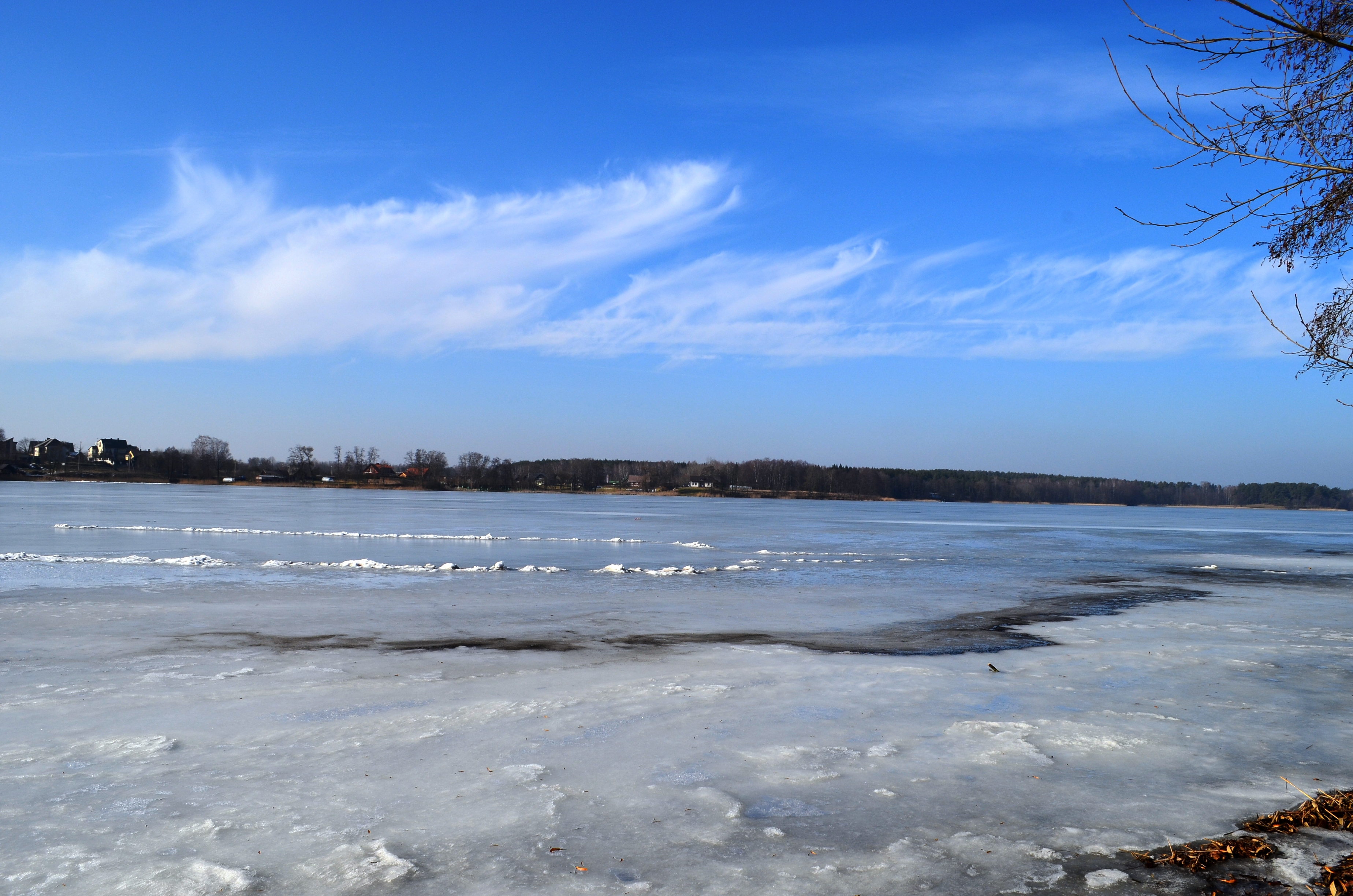 Totoriškių ežeras, Trakai